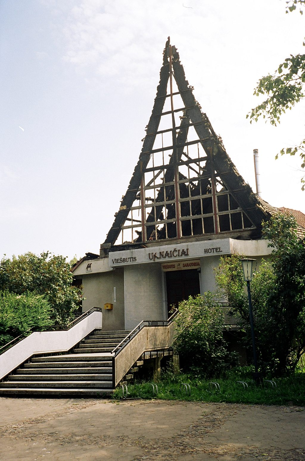 Sudeges sveikatingumo kompleksas